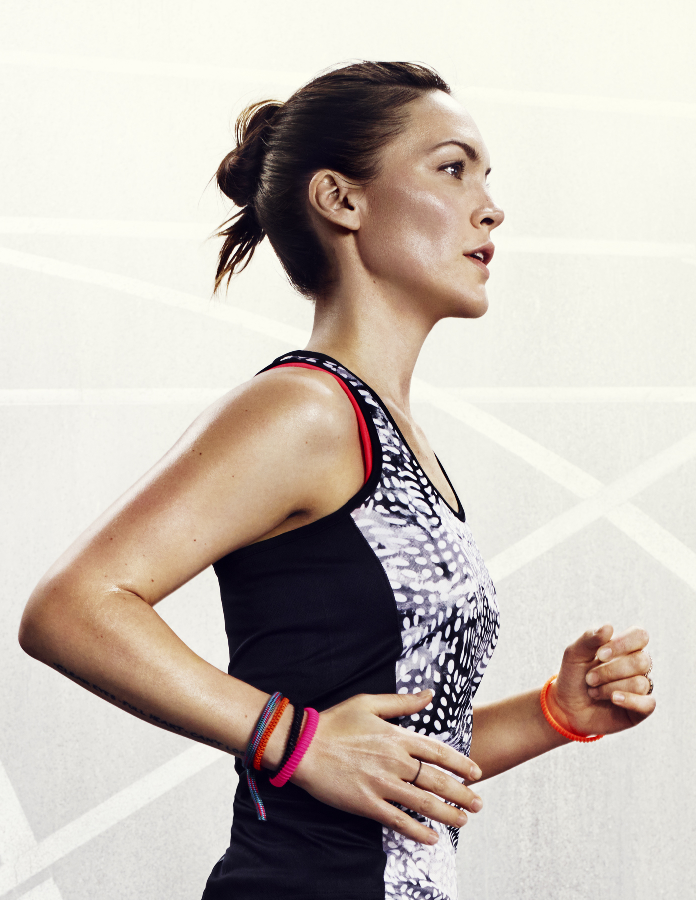 Brita Zackari i en reklamkampanj för Stadium.